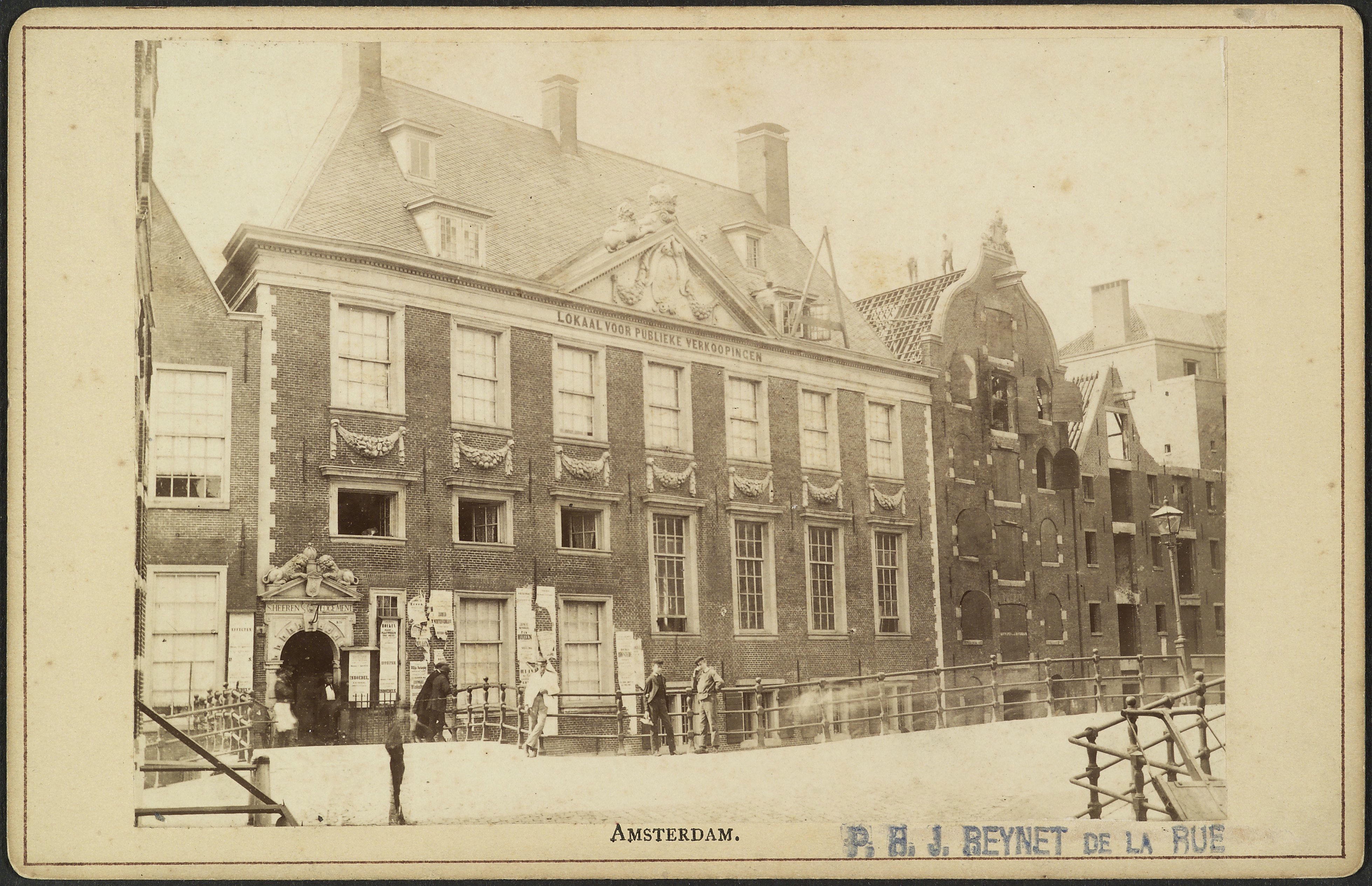 Oudezijds Heerenlogement: Overzicht voorgevel (opmerking: Kabinetfoto)